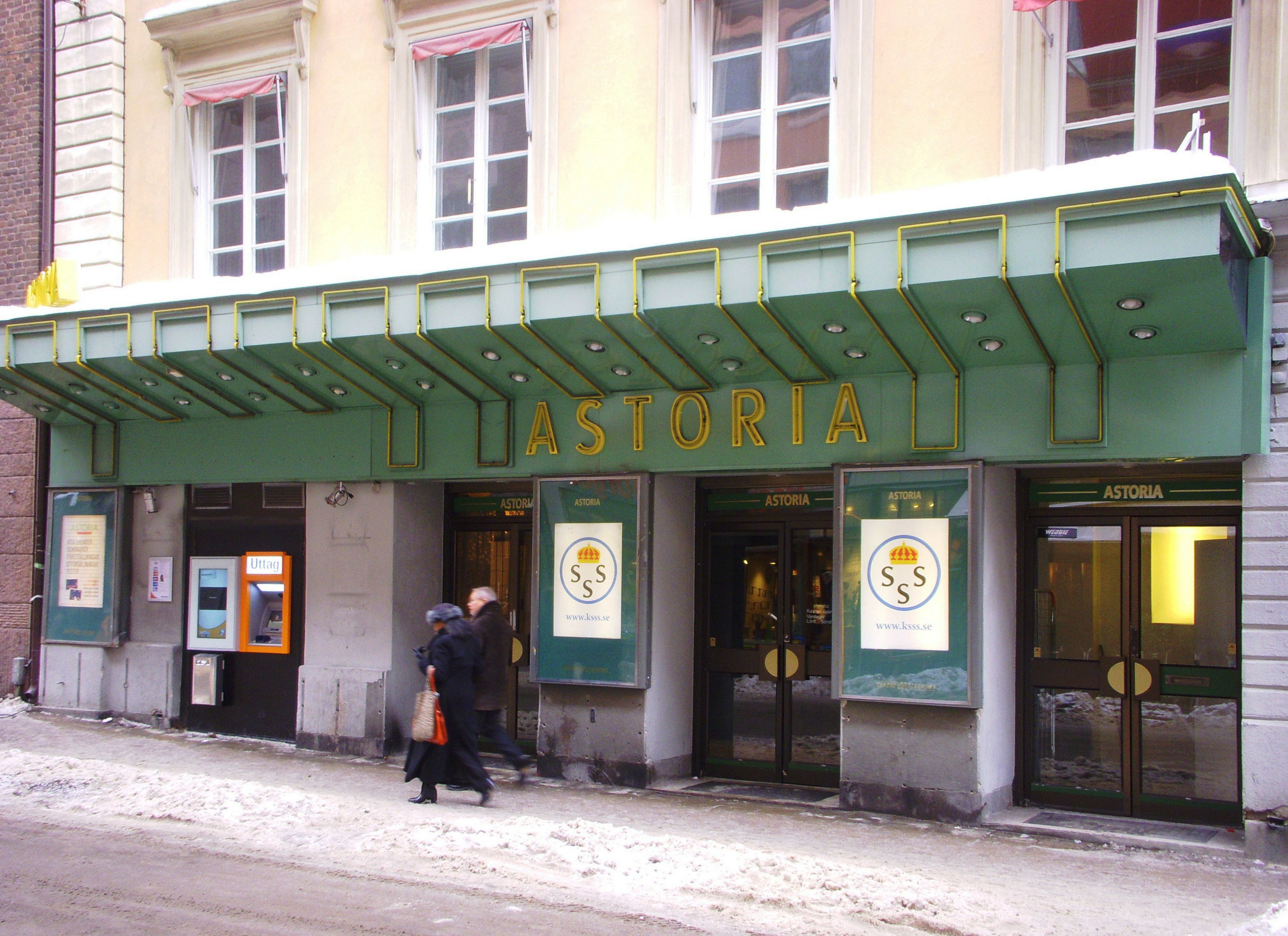 Entré och baldakin till biograf Astoria (nedlagd 2007)